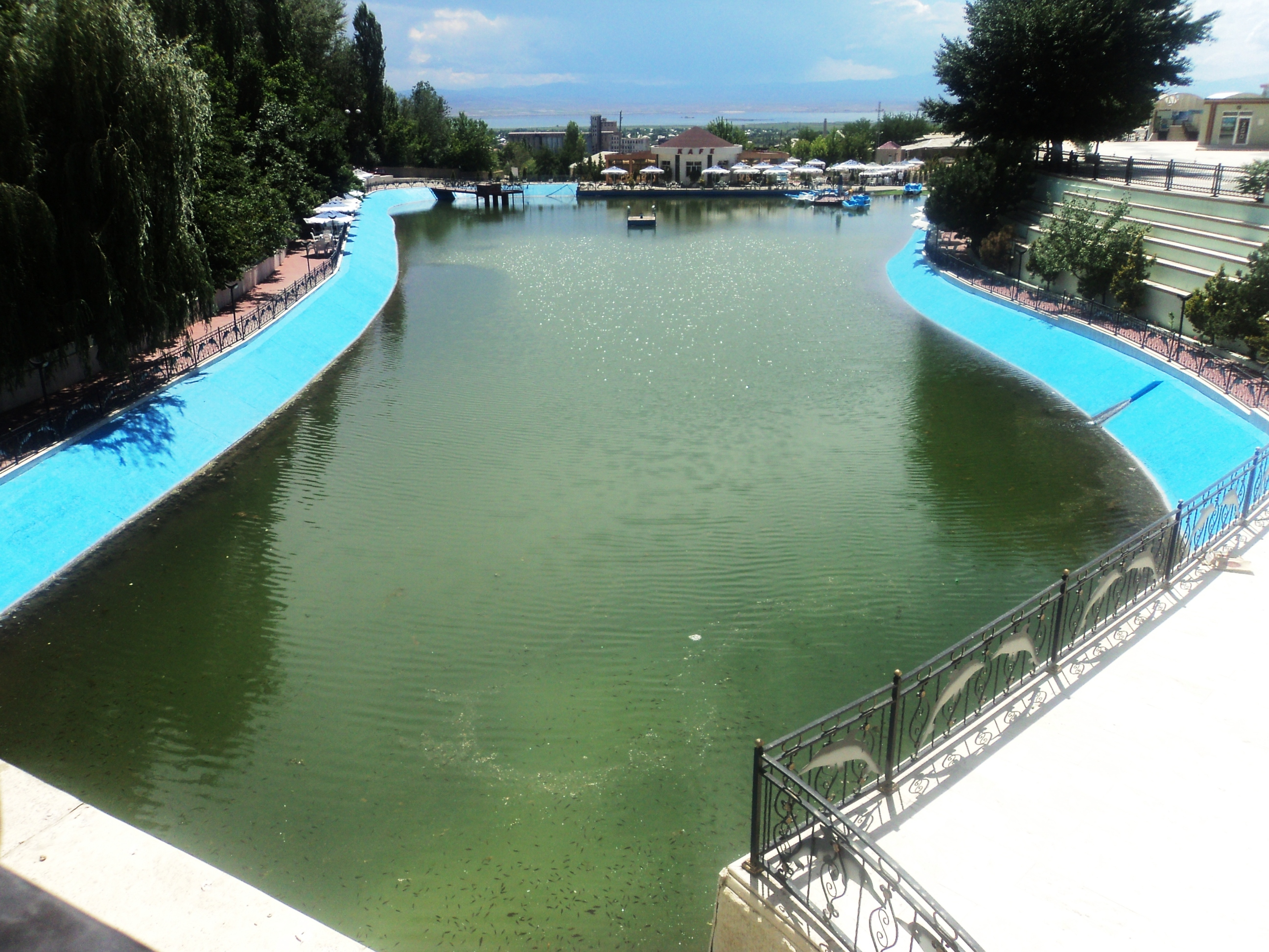 Bazargölü, Naxçıvan şəhəri, Azərbaycan Respublikası